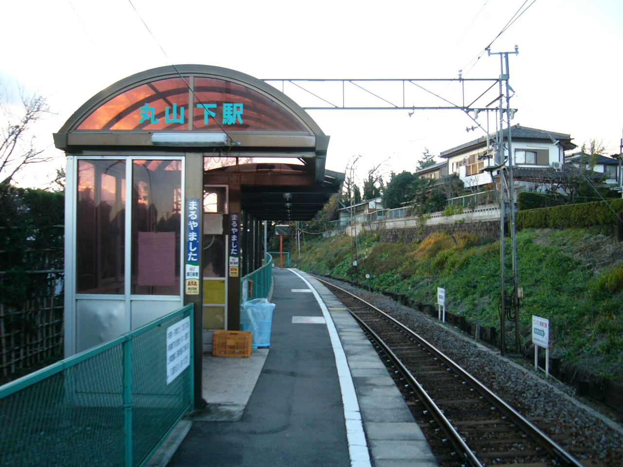 Maruyamashita Station